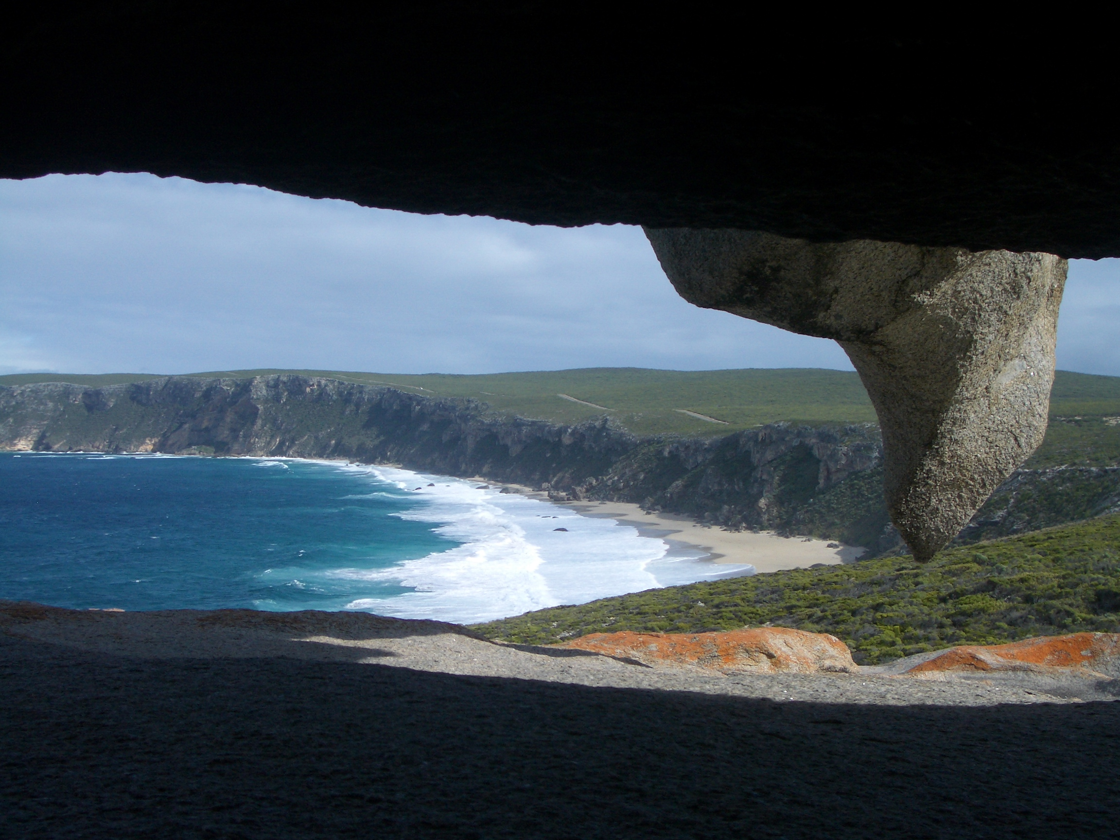 Beschreibung: Remarkable Rocks auf Kangaroo Island in Australien Quelle: Urlaubfoto, 31.03.2006 Fotograf oder Zeichner: Fabian Bolliger Lizenzstatus: GNU/FDL